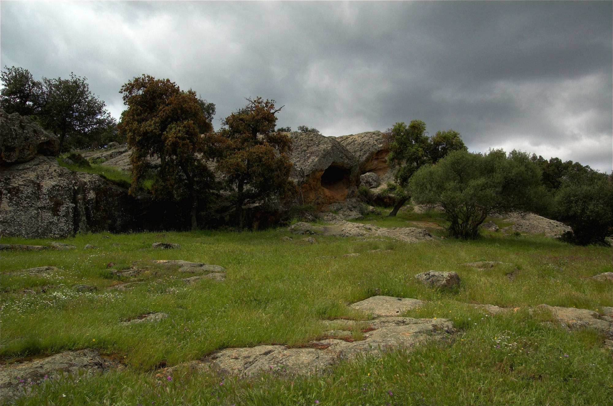 Zona de las piedras.